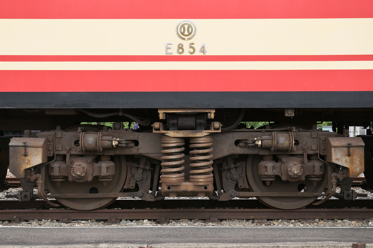 西武鉄道E851形電気機関車の中間台車。横瀬車両基地の保存車（E854）。